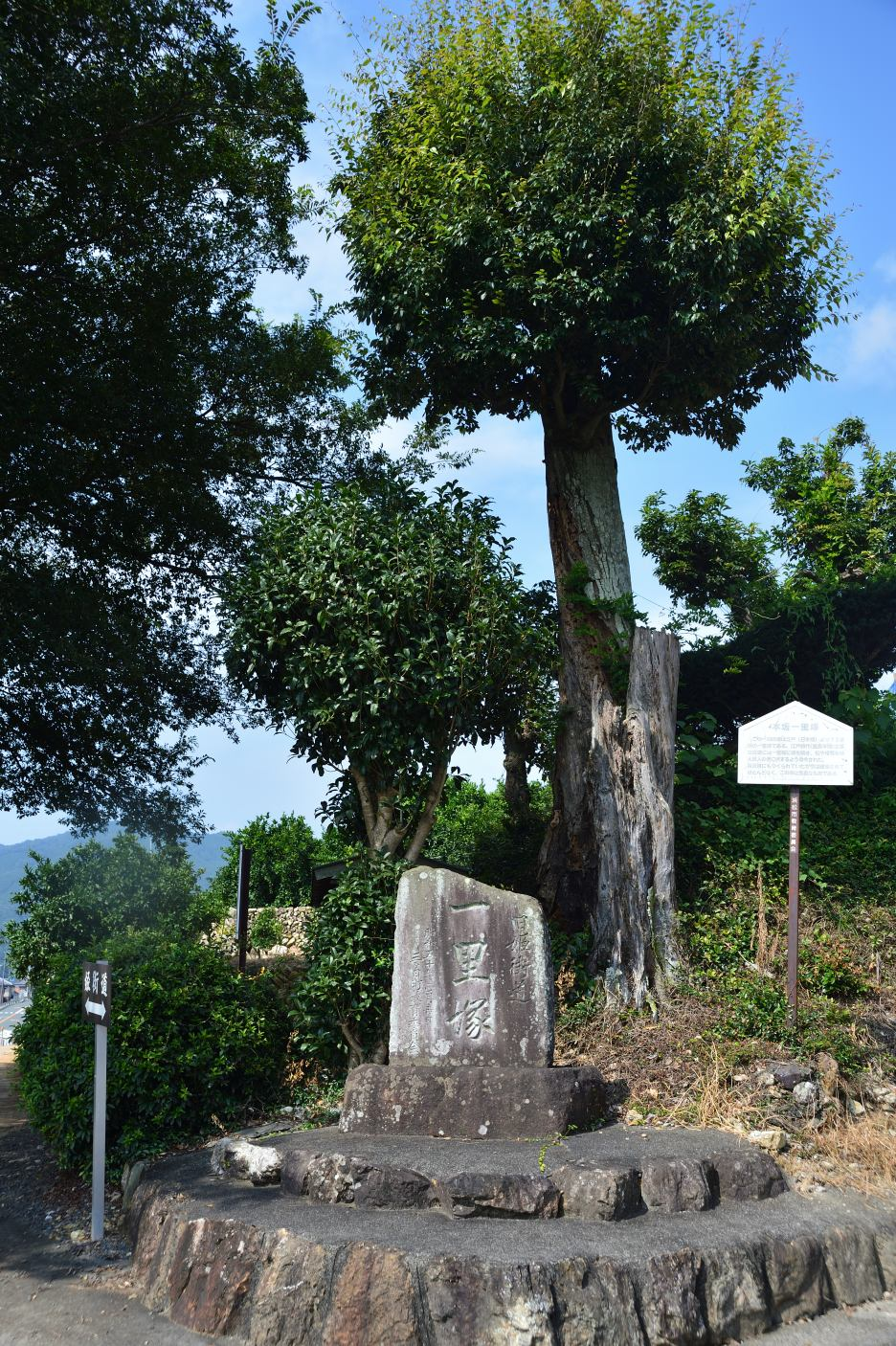 三ヶ日に残る本坂道（姫街道）の一里塚。